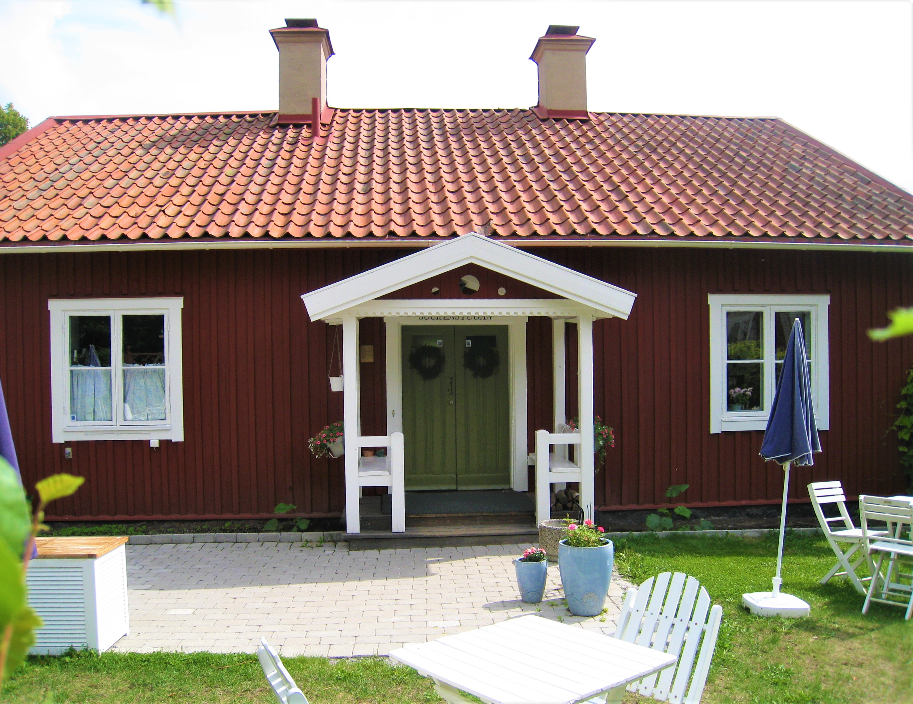 Bromma sockenstuga (gamla prästgården) vid Bromma kyrka, Bromma, Stockholm.